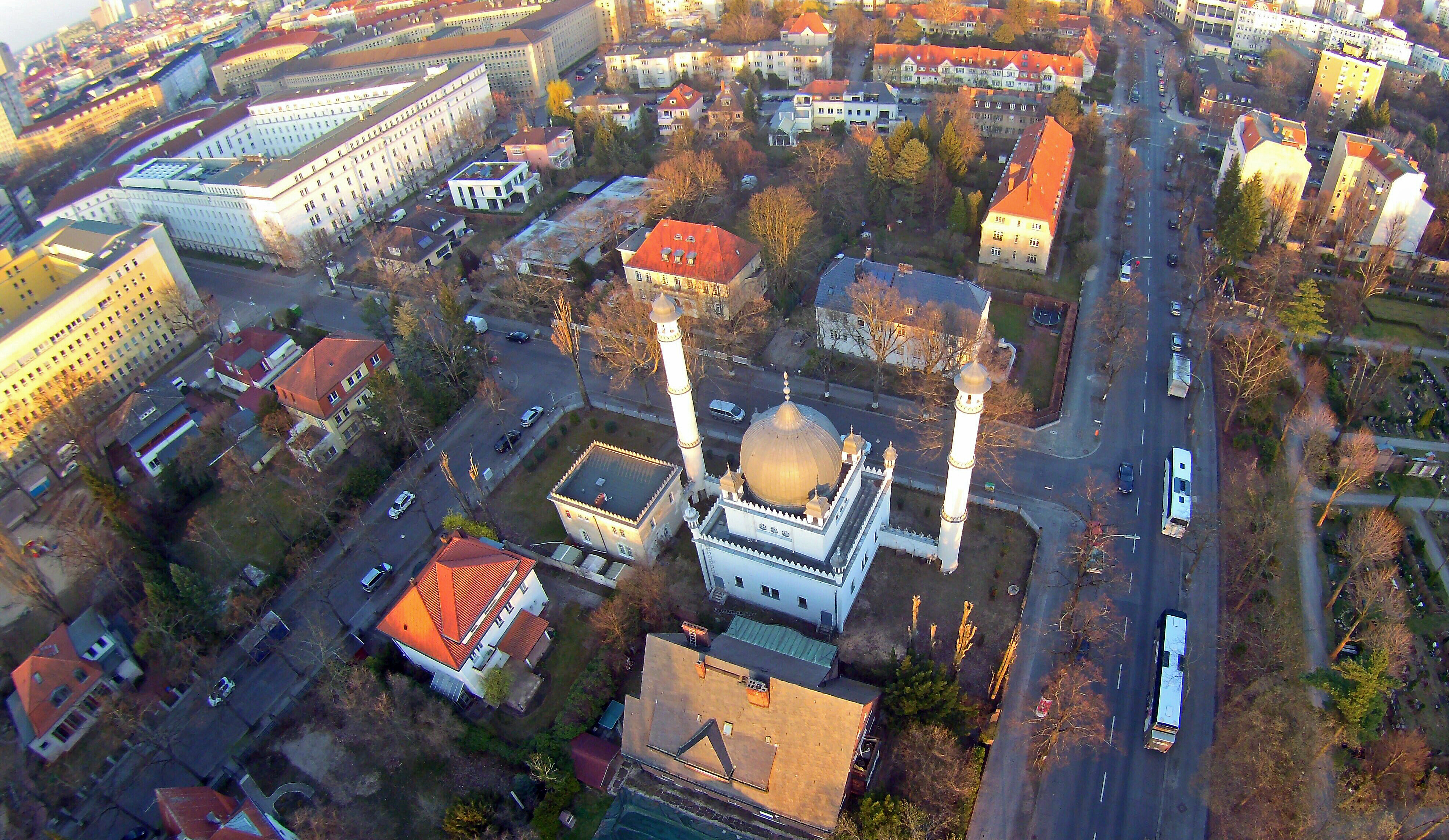 Moschee in Berlin Wilmersdorf